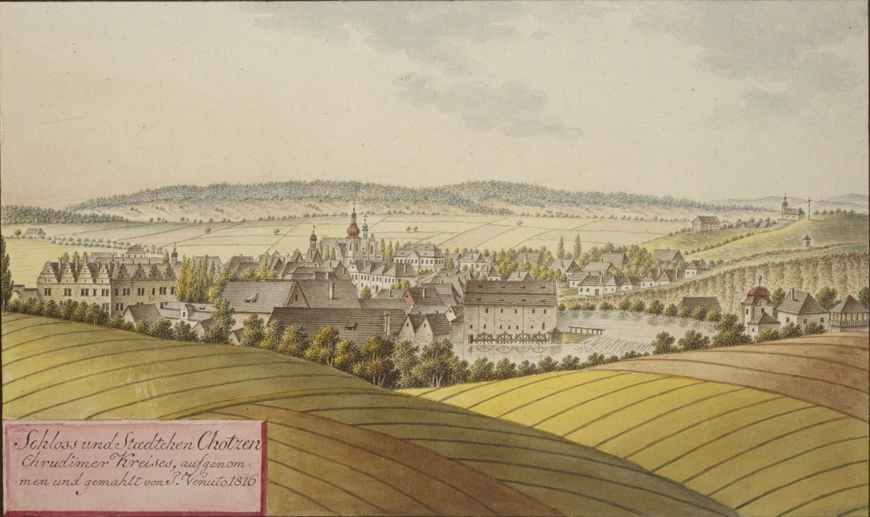 Choceň. Schloss und Stadtchen Chotzen Chrudimer Kreises, aufgenommen und gemahlt von J. Venuto 1816